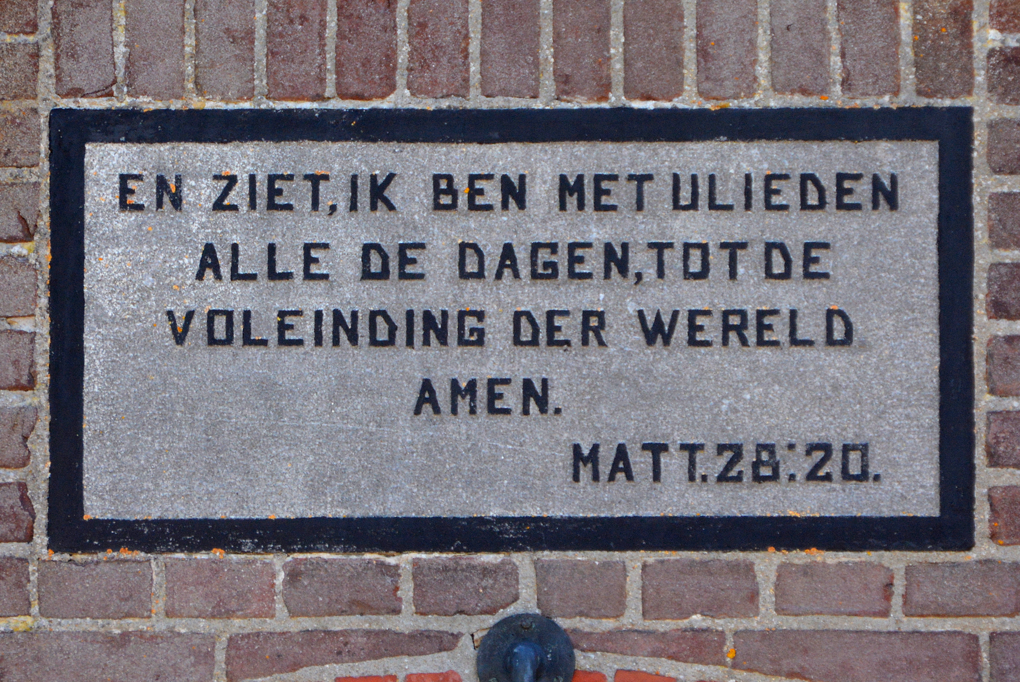 Gevelsteen Marthakerk, Raard